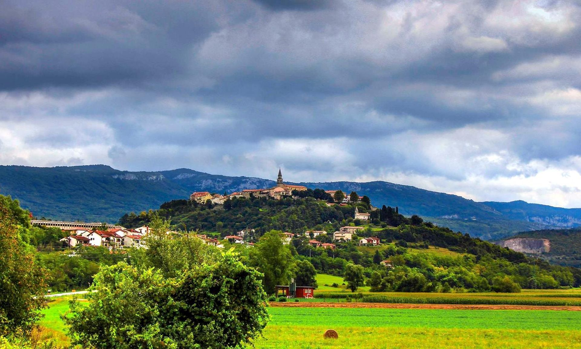 Buzet